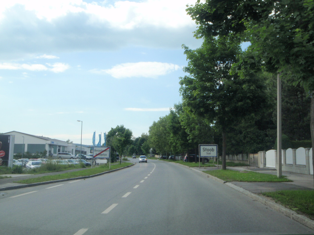 Oberpullendorf und Stoob Süd